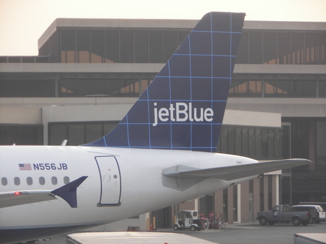 tail jetBlue Airbus A320-232 (N556JB) [–jetblue.jpg–]